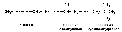 Izomery pentanu Autor: Antonín Vítek, e-mail: avitek(at)lib(dot)cas(dot)cz